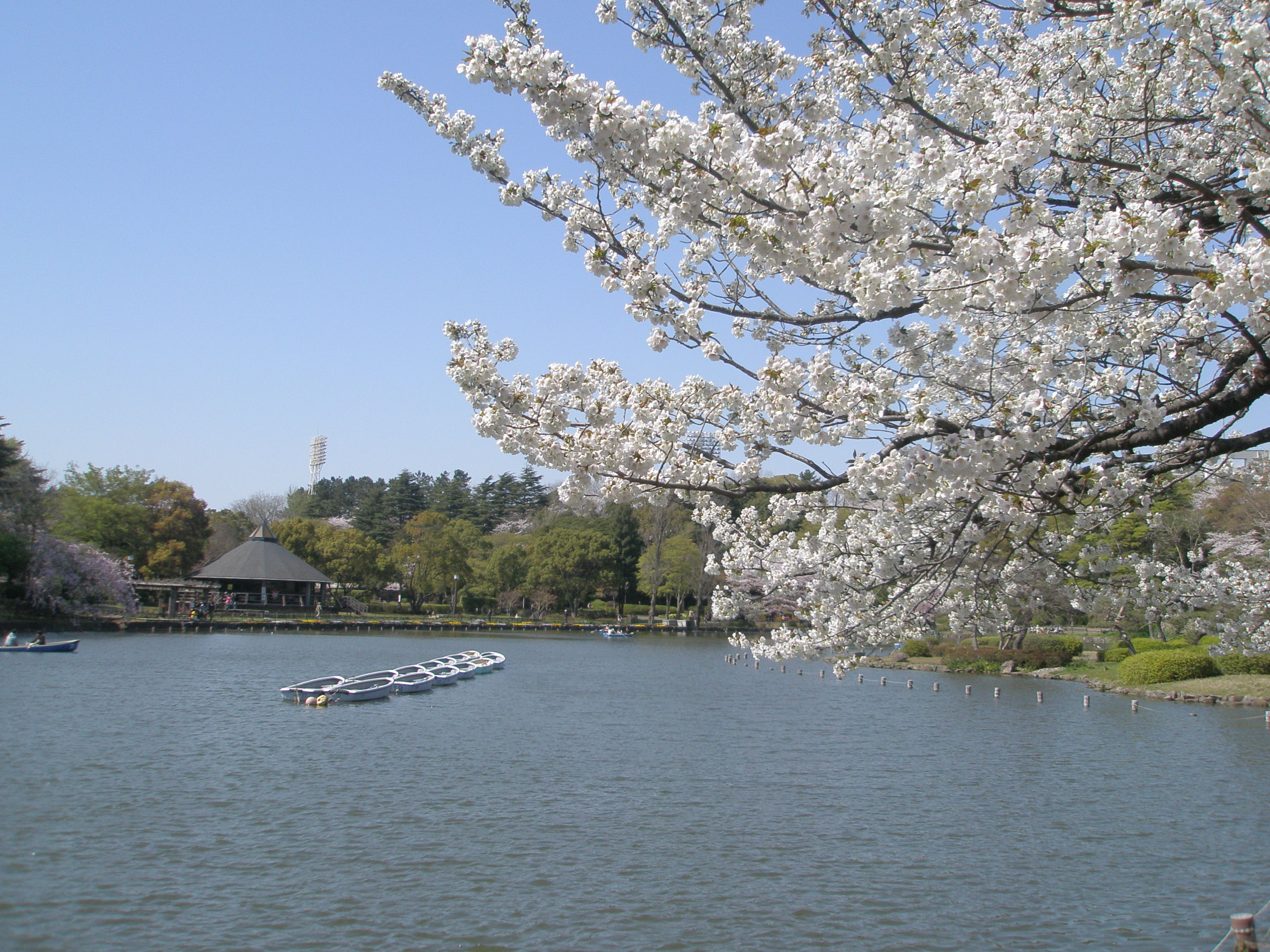 千葉公園綿打池